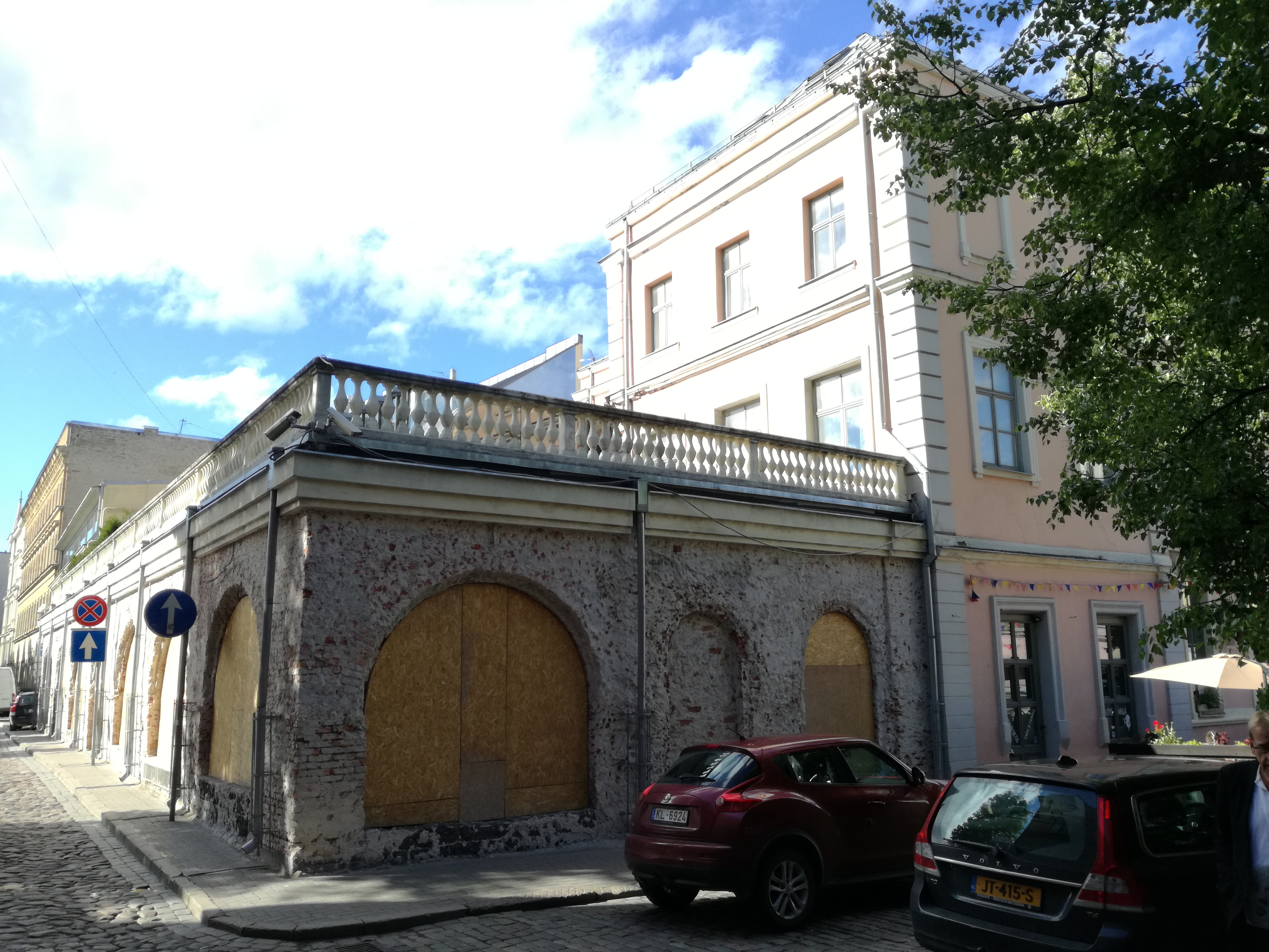 Улица в Старой Риге